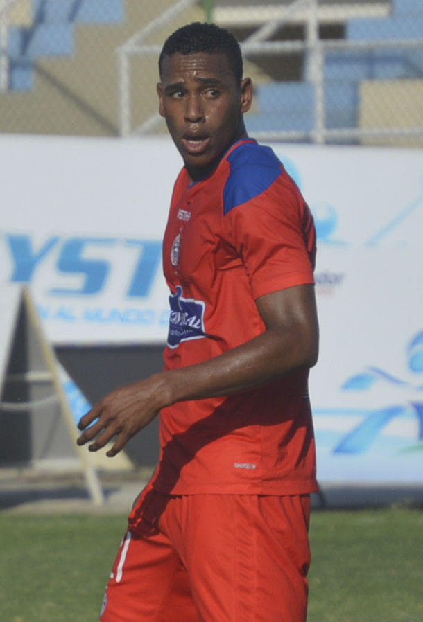 Javier Quiñonez jugando para el Olmedo en el 2015